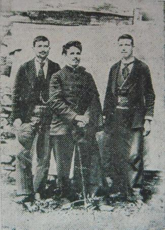 Андон Дечев, Вълчо Сарафов и Иван Славов, 1900 година